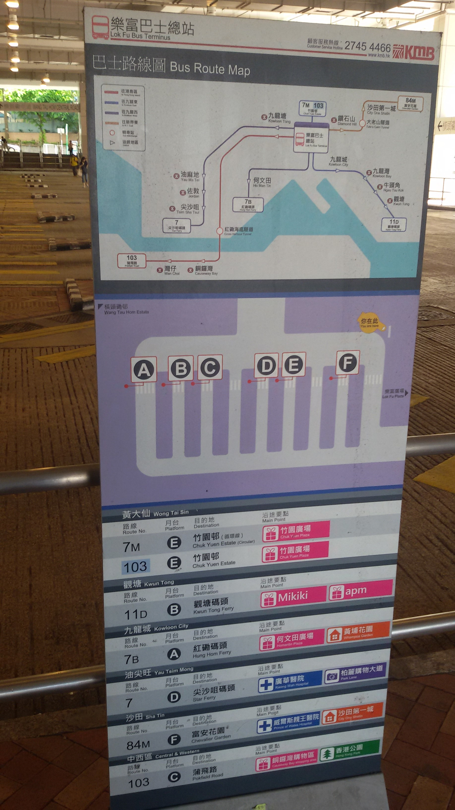 中文（香港）: 站內巴士線一覽